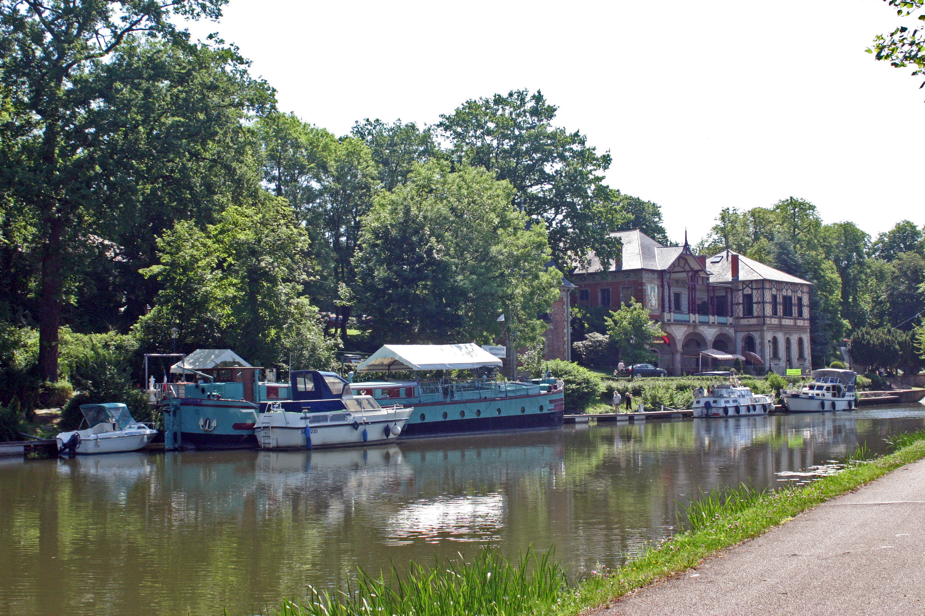 Sarreguemines, Casino de la Faïencerie